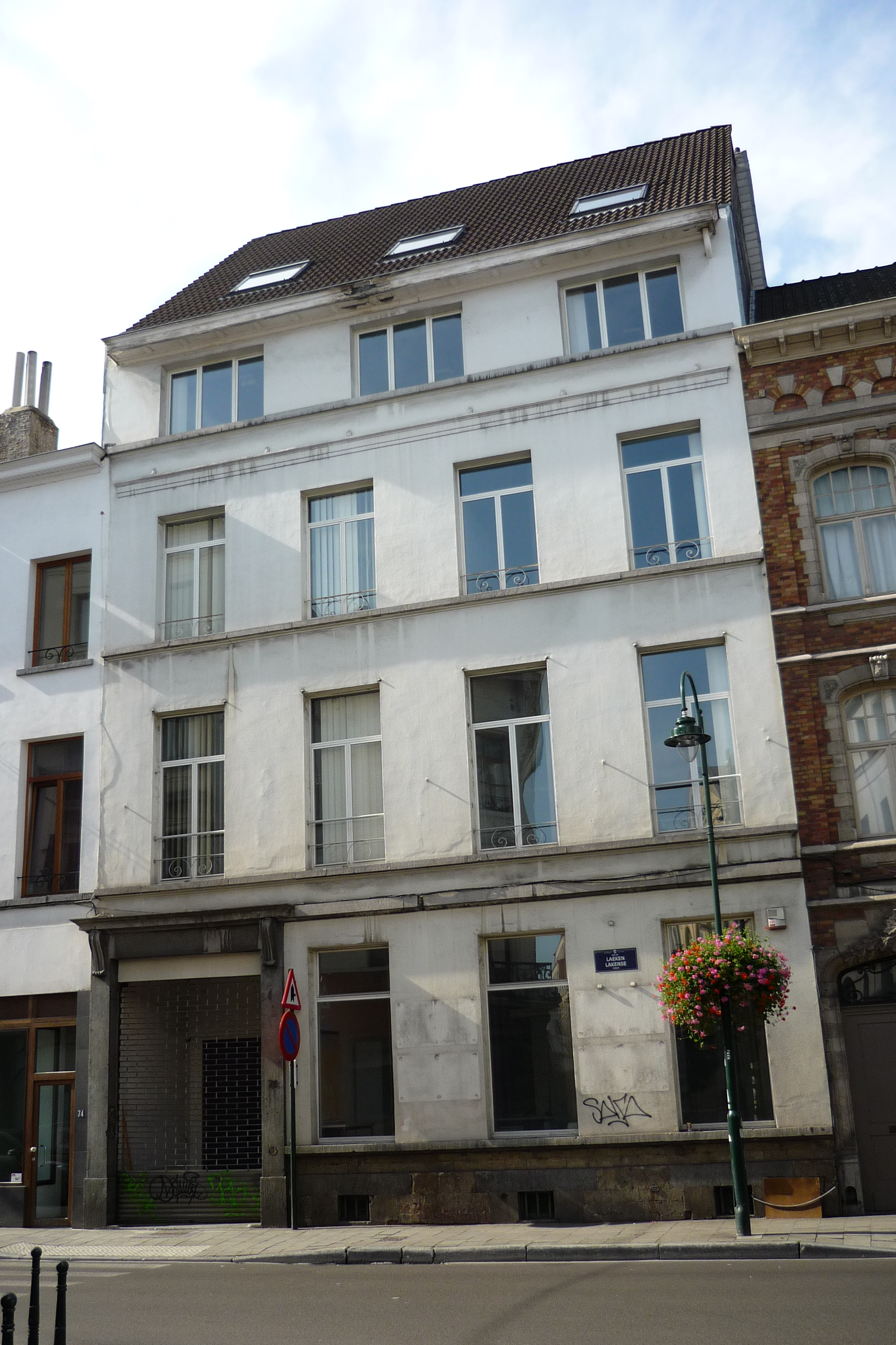 Hôtel de maître de la famille POELAERT, construit par Philippe Poelaert en 1824 , et où a vécu dès l'enfance l'architecte Joseph Poelaert. Ils y étaient voisins du grand architecte Henri Partoes (actuel 78).